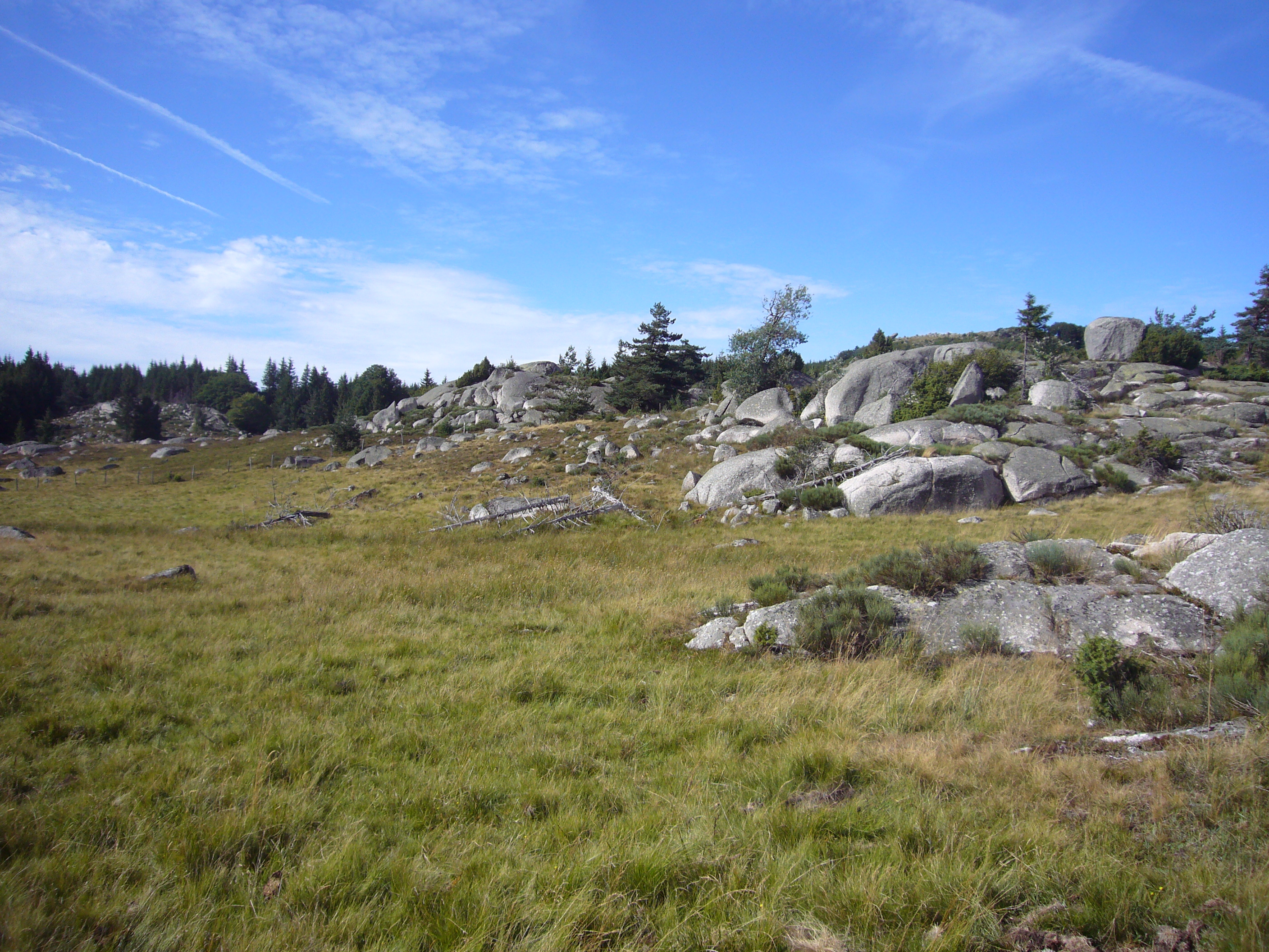 Haute vallée de la Biourière (Aubrac, Massif central, France) au lieu dit "lou gour negre" (le gour noir) non loin de la montagne de Rabios. Altitude : entre 1250 et 1300 m. Nombreuses roches rabotées par les glaciers du quaternaire et blocs erratiques.